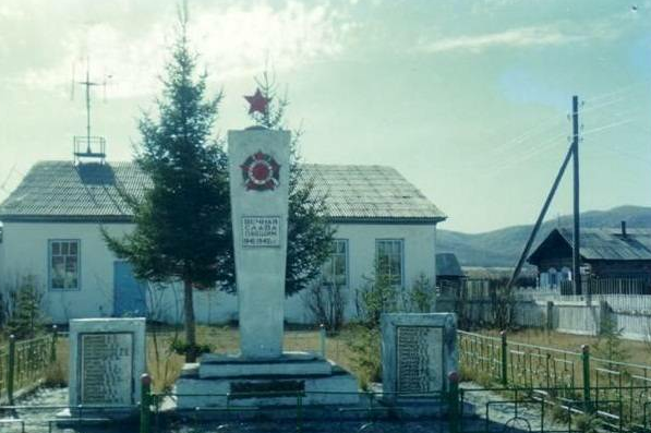 В центре улуса Усть-Бургалтай